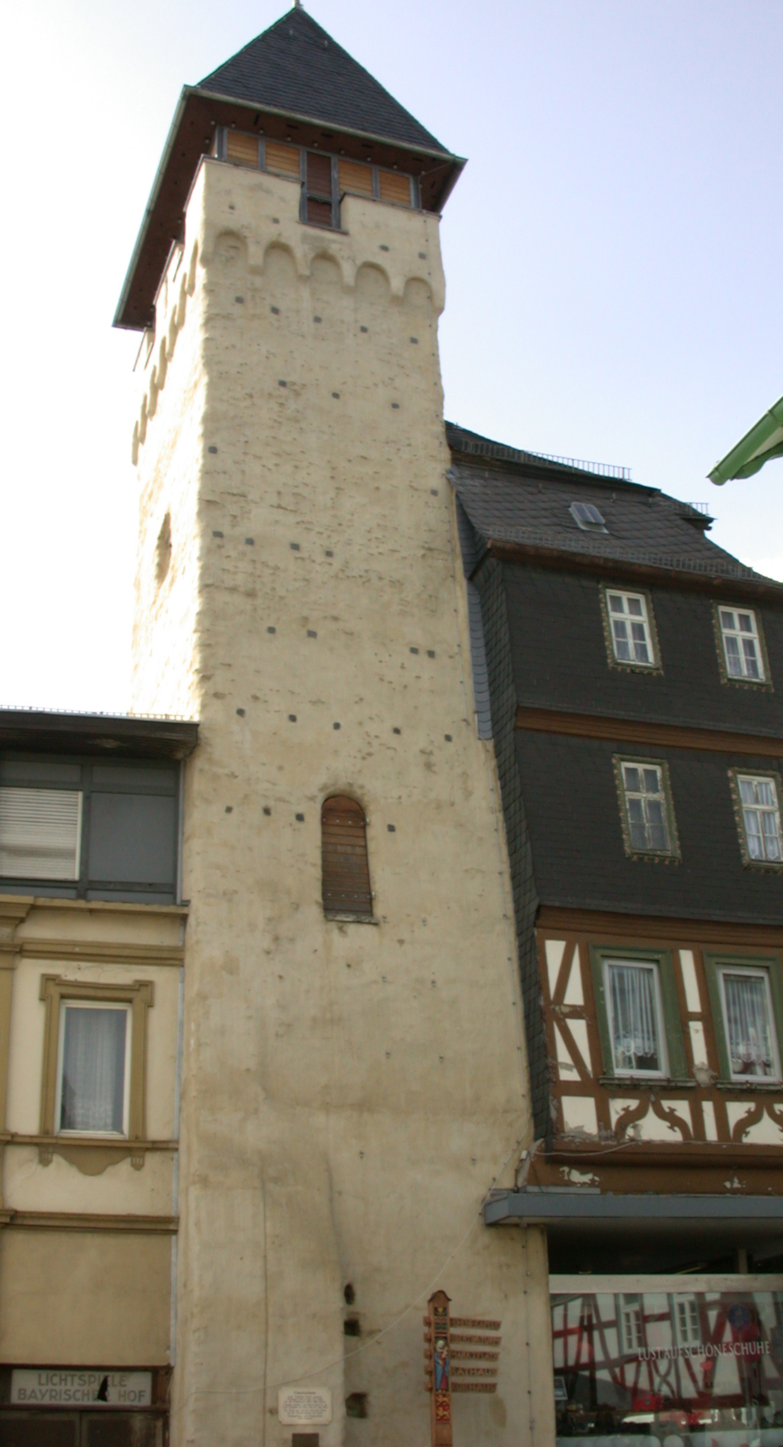 Untertorturm, Bad Camberg, Deutschland